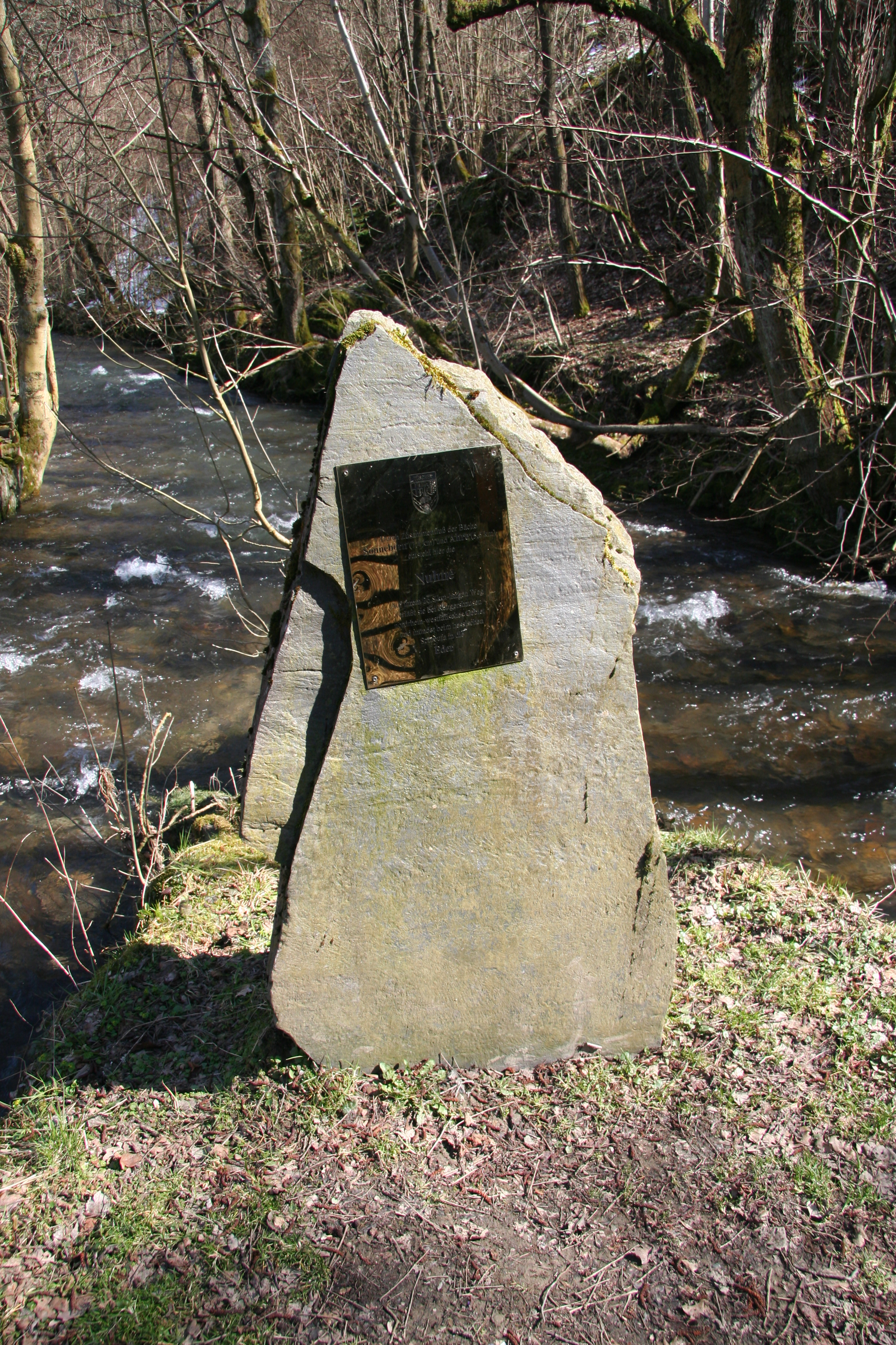 Gedenkstein am Ursprung der Nuhne in Züschen.